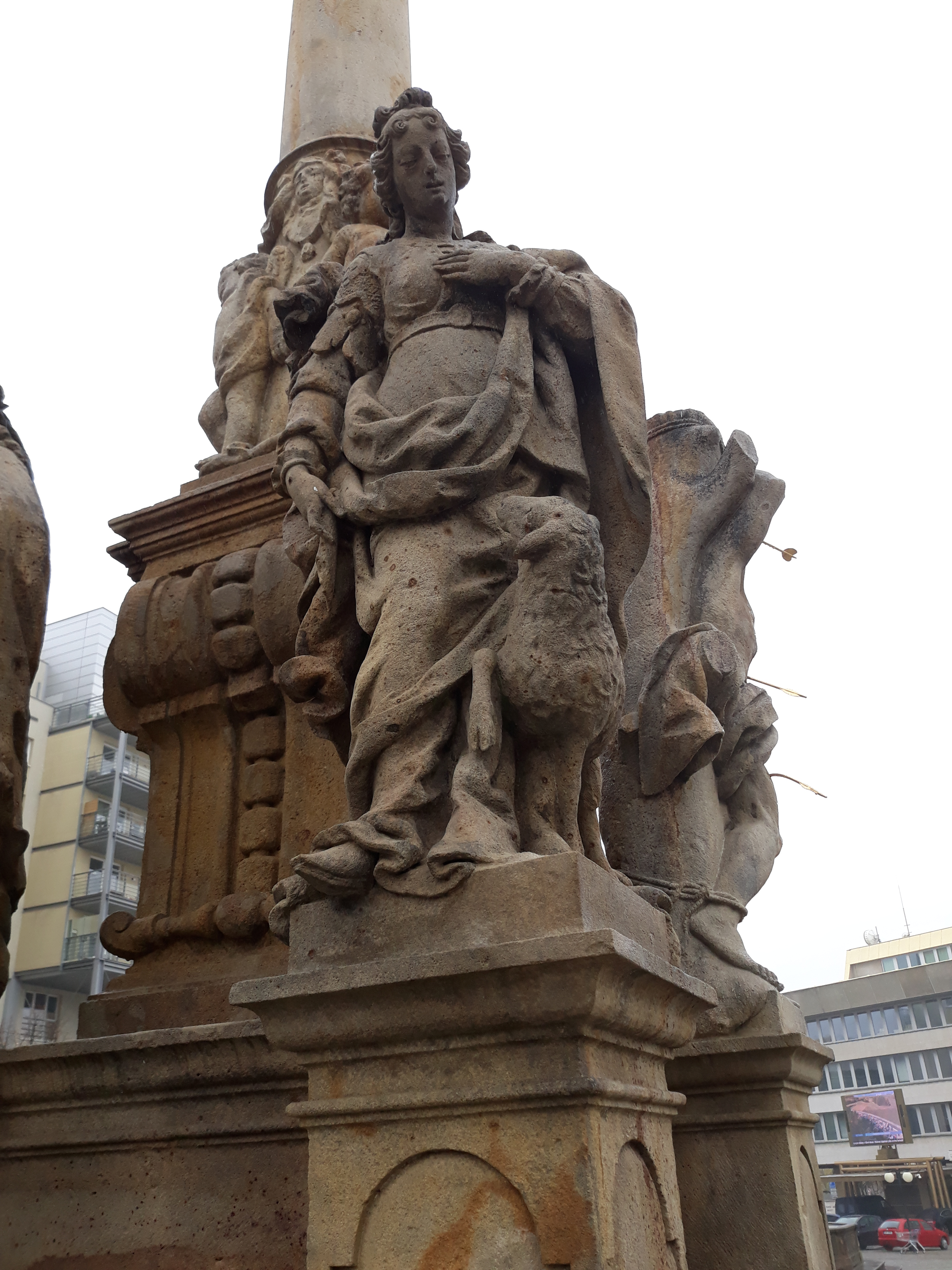 Socha sv. Anežky stojící na levém pilíři zadní strany soklu. Vedle její levé nohy stojí ovce.